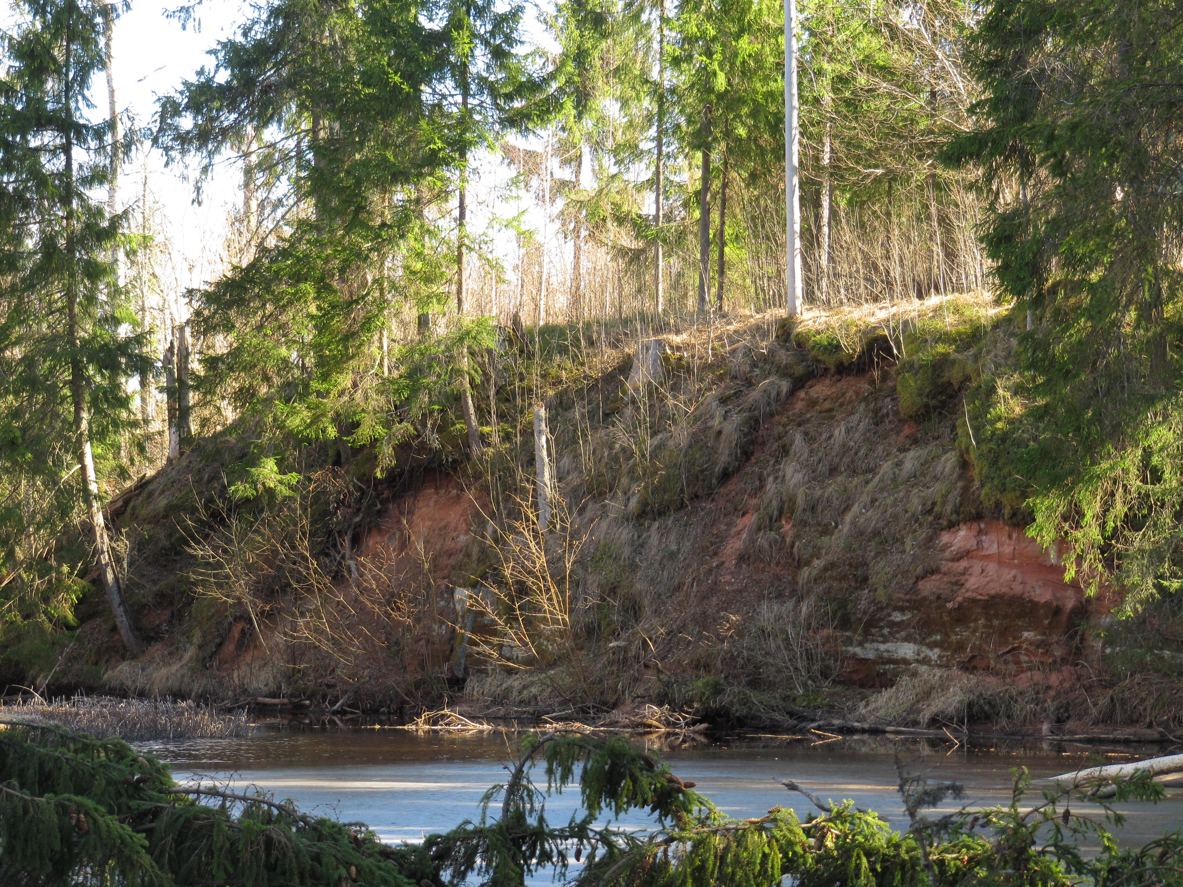 Hendrikhansu paljand Hendrikhansu oja (samanimelise veskijärve)vasakul kaldal. Hendrikhansu oja on Halliste jõe vasakpoolne lisajõgi. Paljand on väga raskesti vaadeldav: paremalt kaldalt piiravad vaadet puud ja põõsad, vasakult kaldalt on ligipääs väga keeruline.